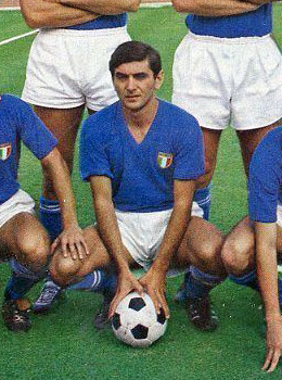 Roma, stadio Olimpico, 1º novembre 1965. Il calciatore dell'Italia, Giacomo Bulgarelli, in posa prima della vittoriosa sfida interna contro la Polonia (6-1) valevole per le qualificazioni al campionato del mondo 1966.